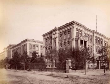 Berlin - Gebäude der Vereinigten Artillerie- und Ingenieurschule ab 1876, Hardenbergstraße / Ecke Fasanenstraße